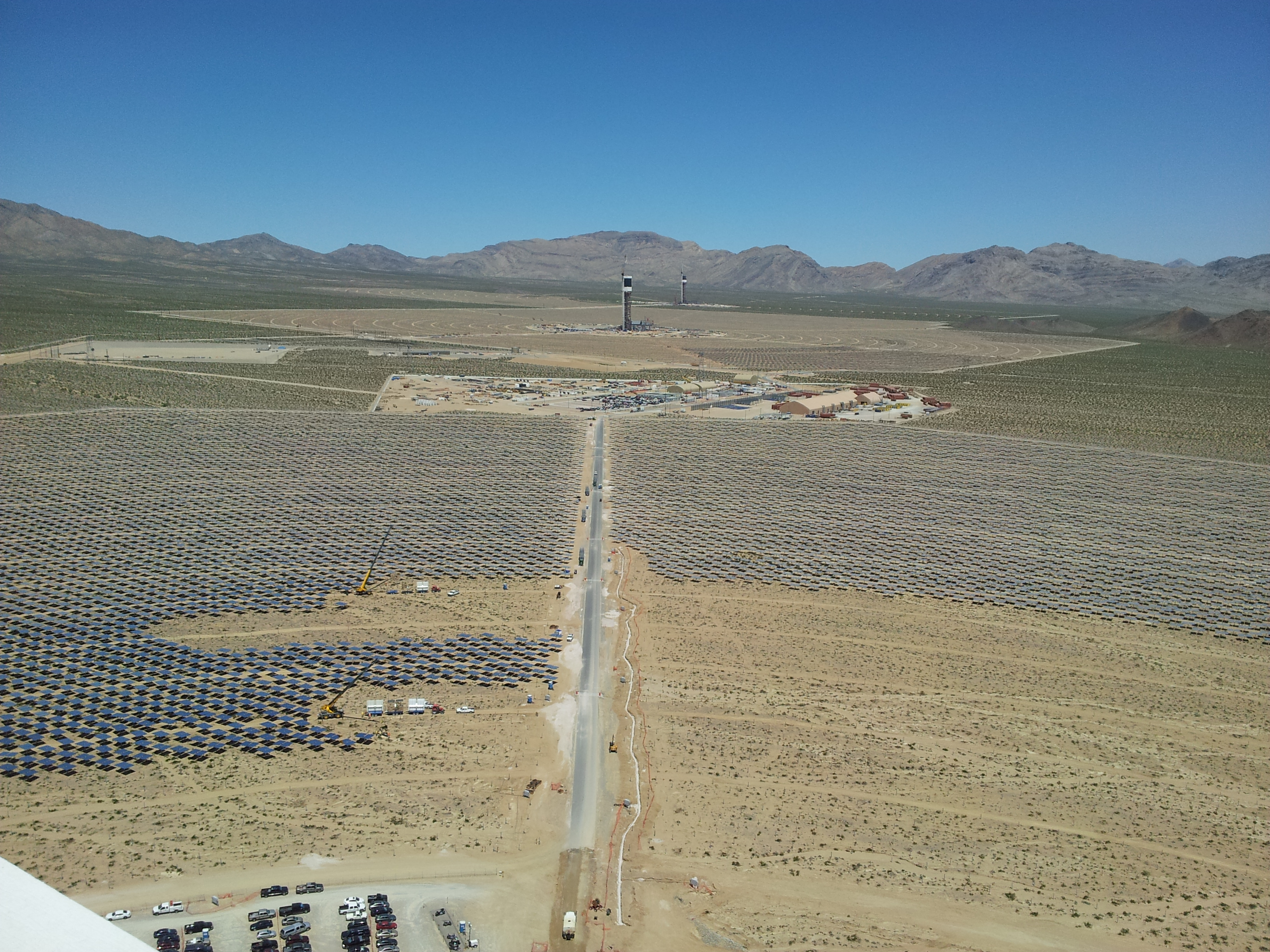 השדות הסולאריים ב-Ivanpah בזמן הקמתם - יולי 2012, מצולמים ממגדל מספר 1